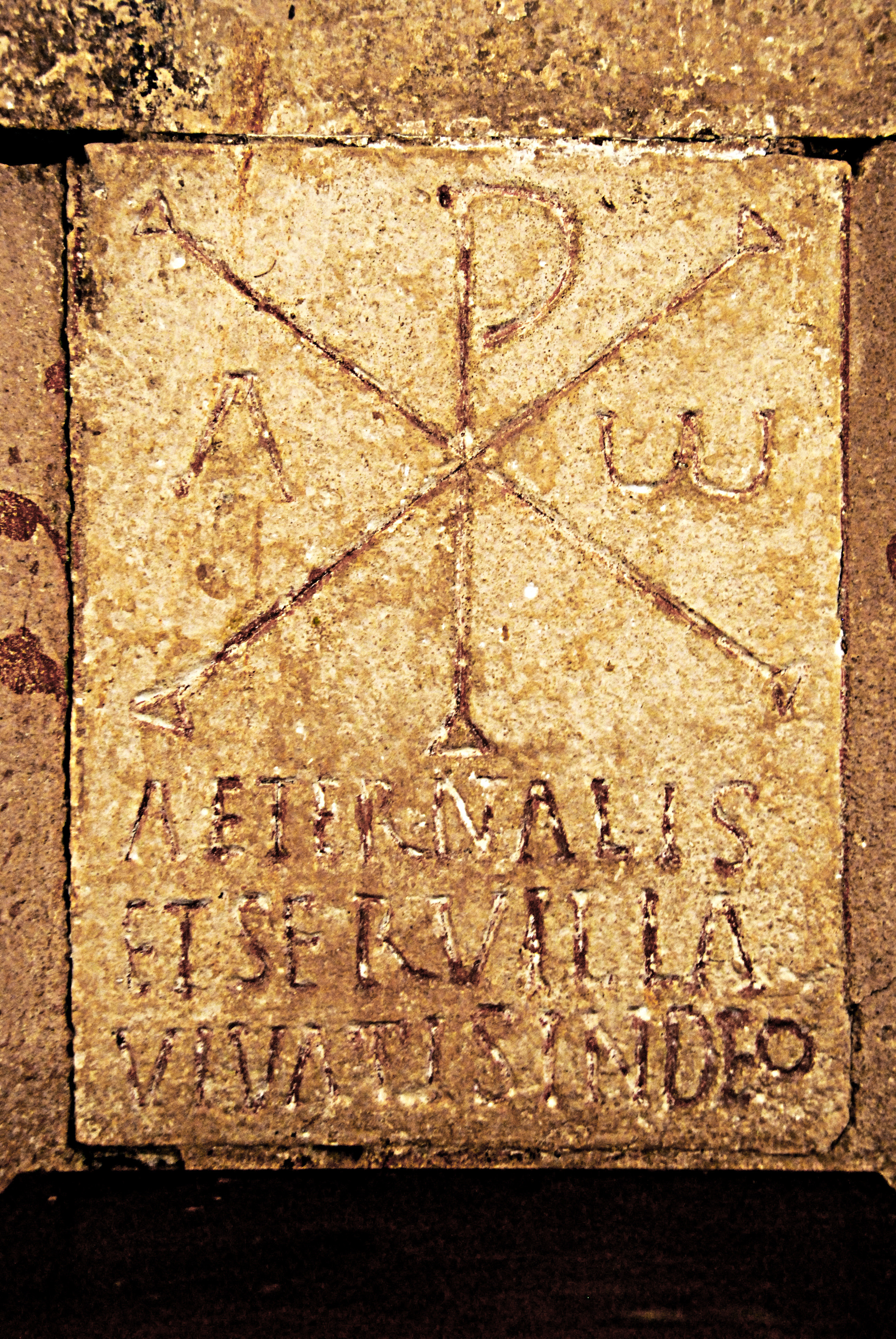 Kirche, Chor, Stele